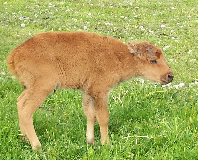 Bison Kalb (Bison bison) in Schmallenberg-Werpe (Germany)